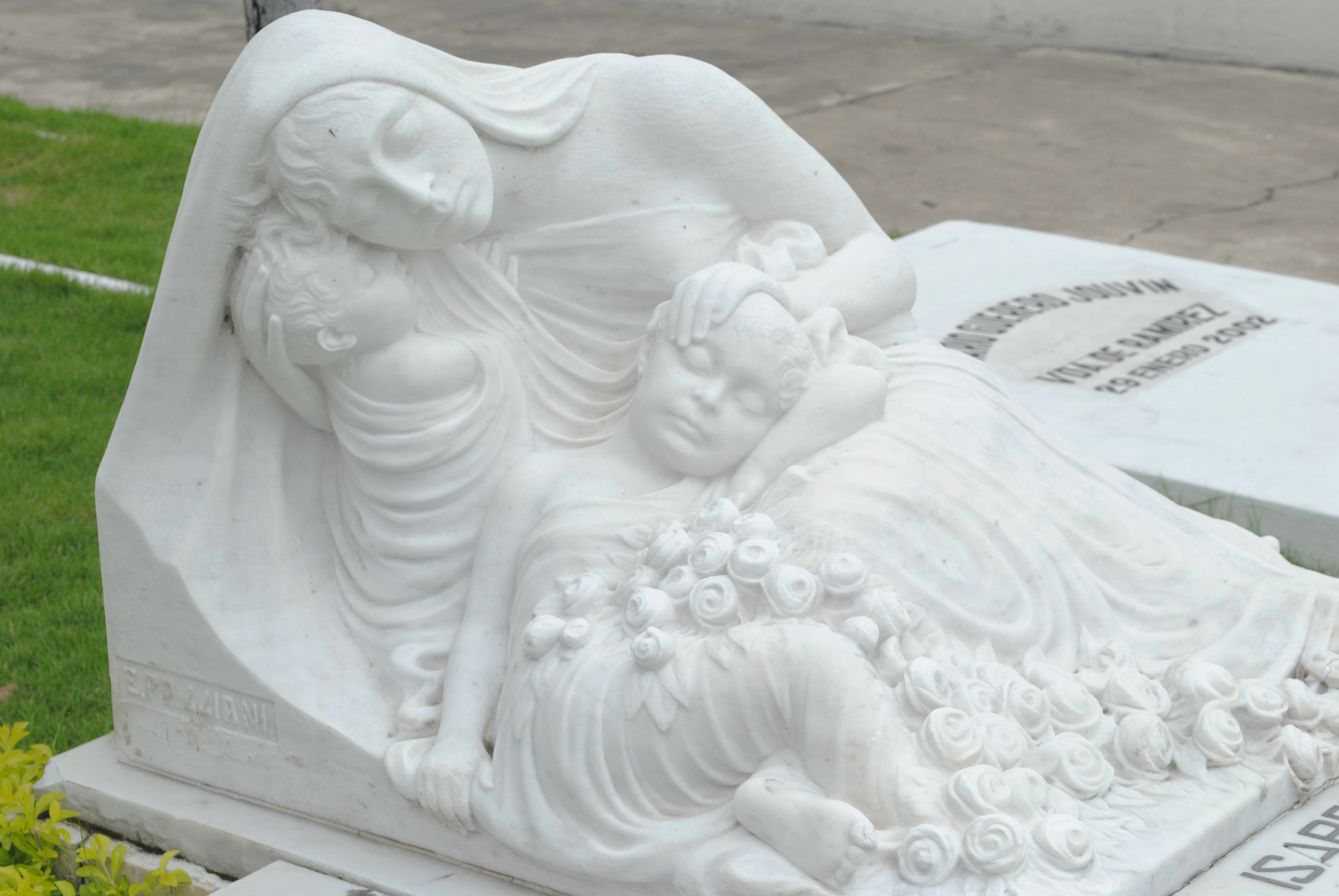 Foto tomada en Wiki Loves Cemeteries